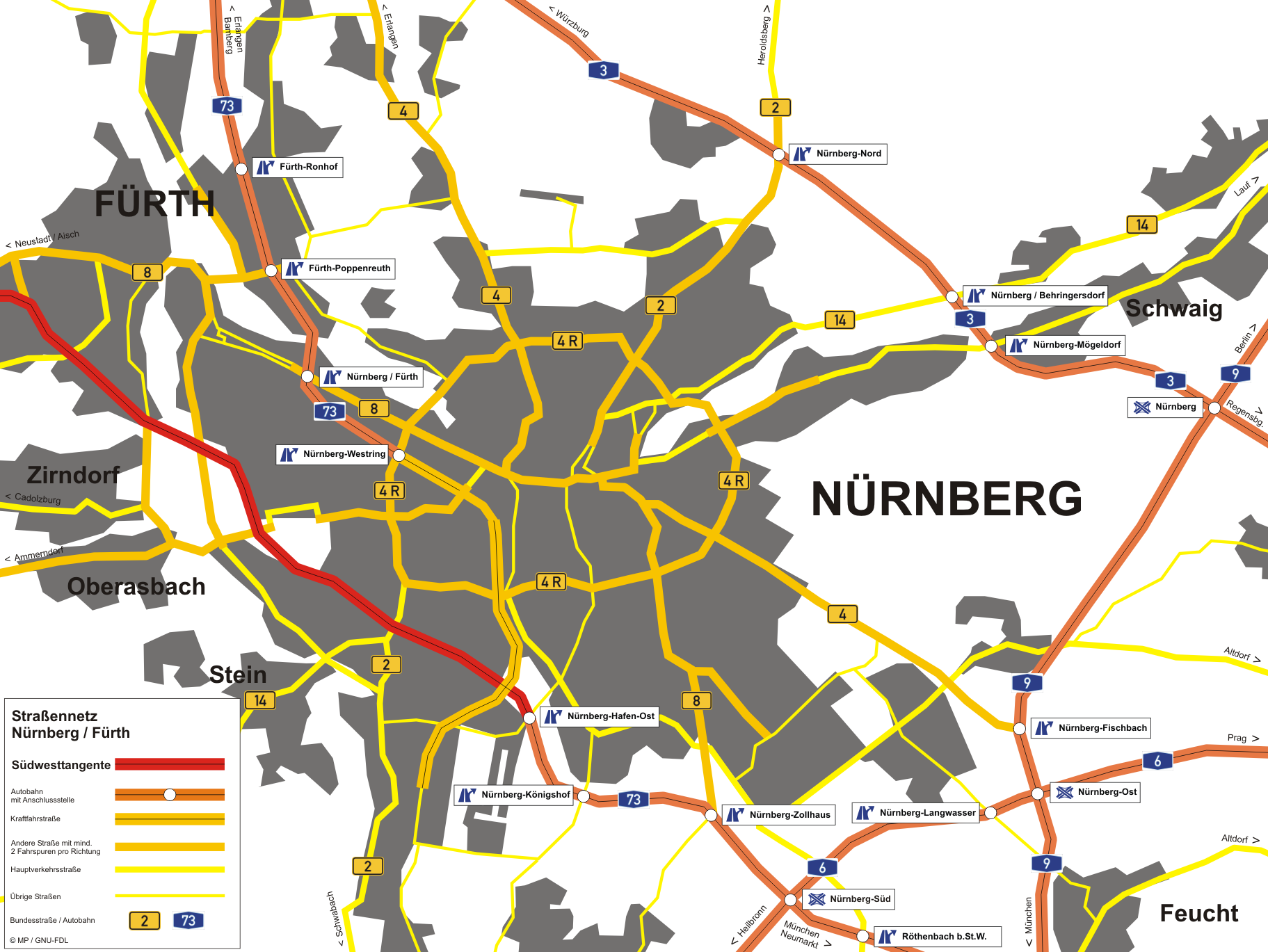 Straßennetz Nürnberg: Südwesttangente